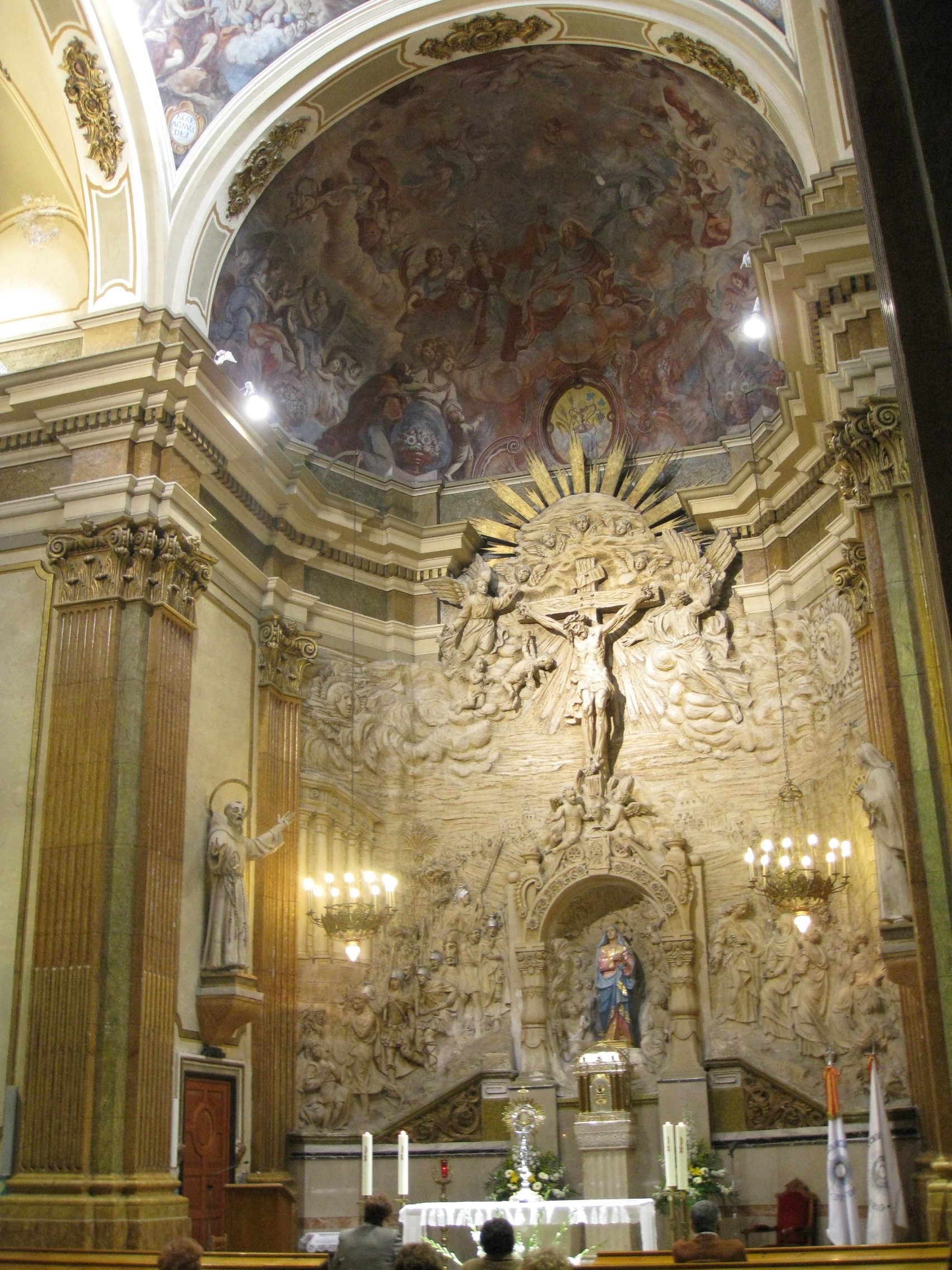 Església de l'Assumpció (Onda) 06.084-001.